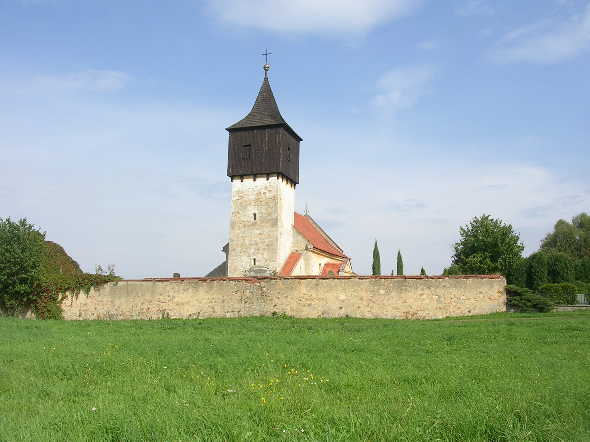 Kozojedy, okres Praha-východ. Kostel svatého Martina v místě původní vsi, severozápadně od dnešní obce. Původně románský, goticky a barokně přestavěn.